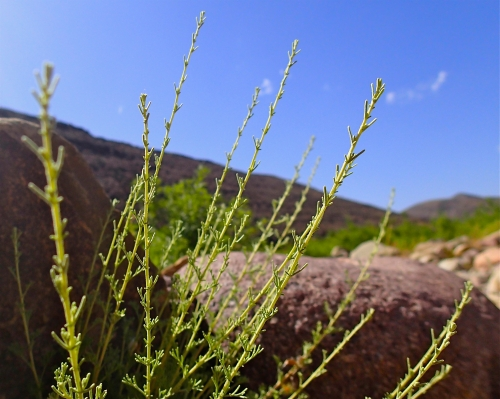 Présente de l’Espagne au Proche-Orient, de l’Afrique du Nord à l’Egypte, l'Armoise herbe blanche est l'herbe aromatique la plus répandue au Maroc. Comme l’Absinthe (Artemisia absinthium) ou Armoise romaine (Artemisia pontica), l’Armoise herbe blanche est riche en thuyone. Le Maroc est le seul producteur de son huile essentielle, dont il exporte chaque année environ 30 tonnes...